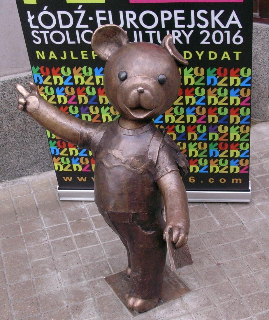 Pomnik Misia Uszatka, autorstwa Magdaleny Walczak i Marcina Mielczarka